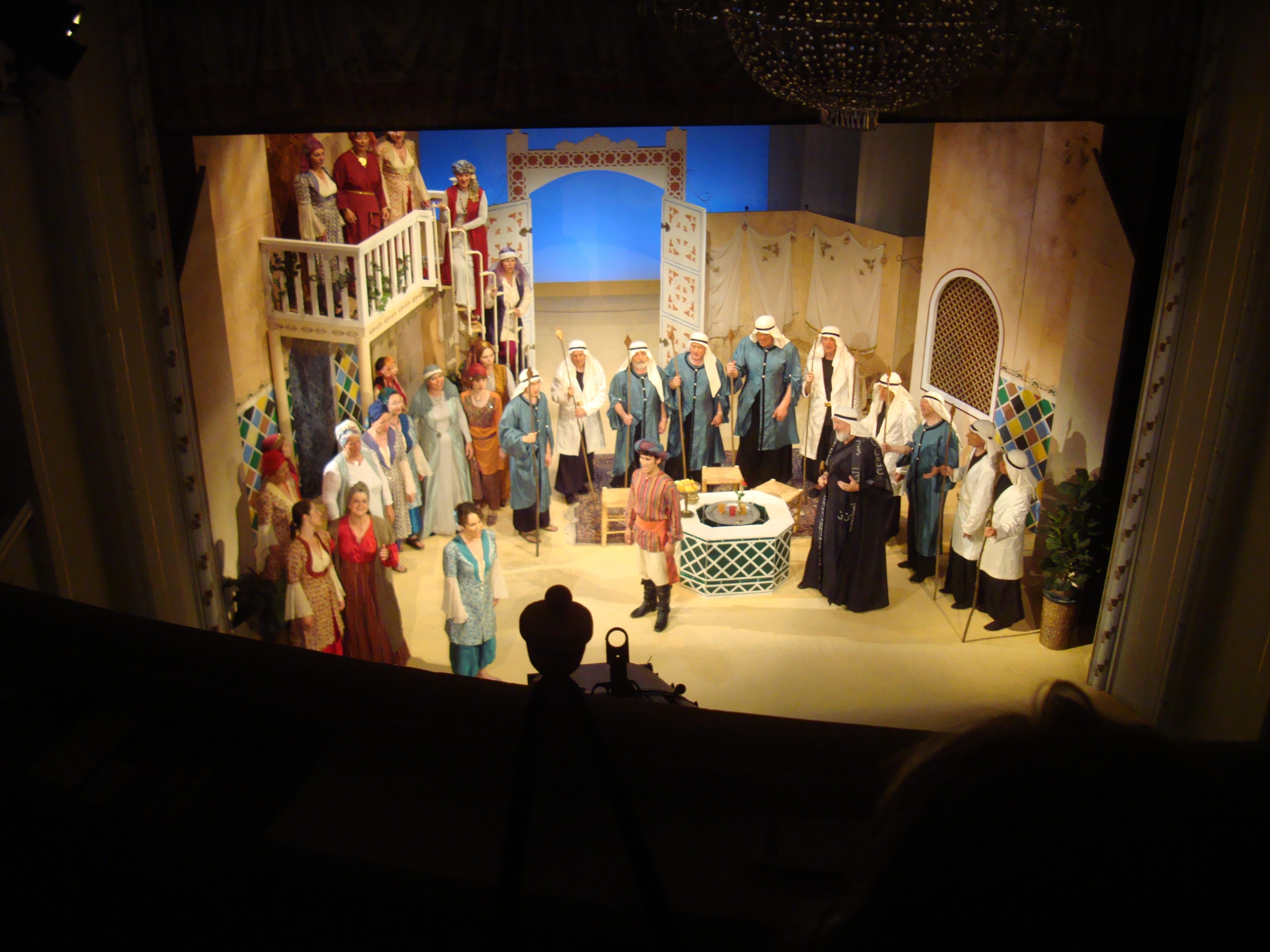 Garcia – Kalif 4